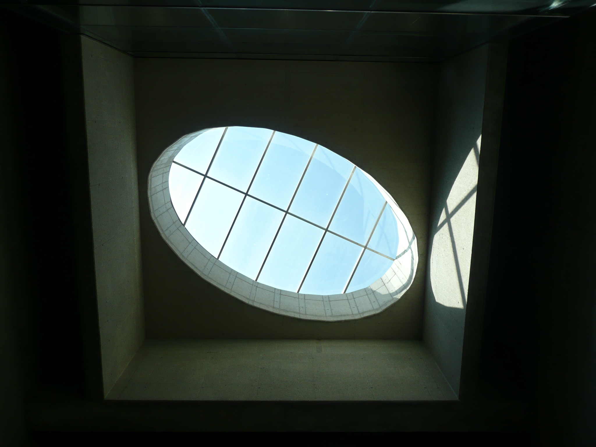 U2 Wien Praterstern.